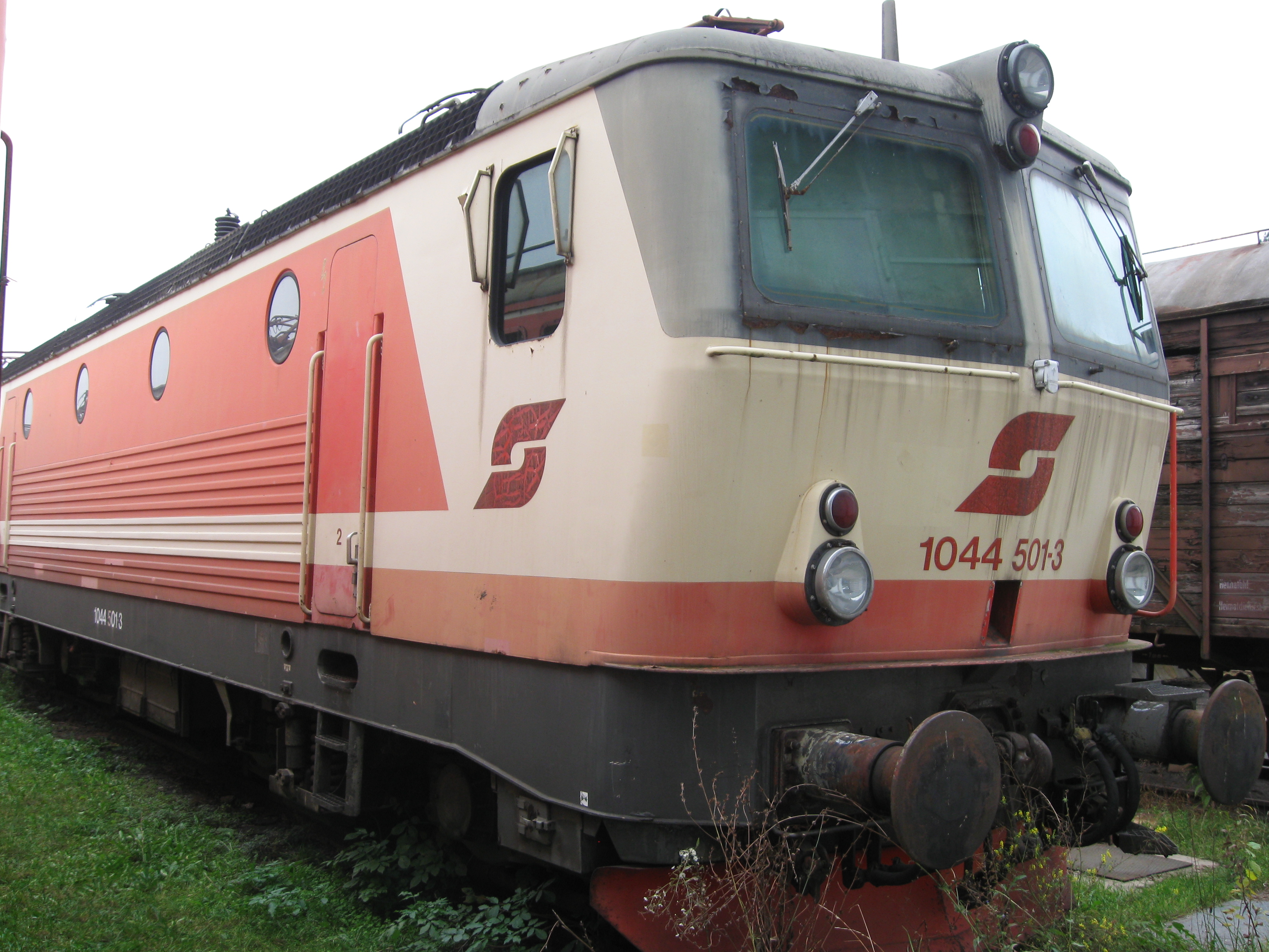 ÖBB 1044 501-3 im Eisenbahnmuseum Strasshof am 26. Oktober 2014